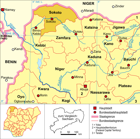 politische Karte Nigerias (Bundesstaat Sokoto hervorgehoben)